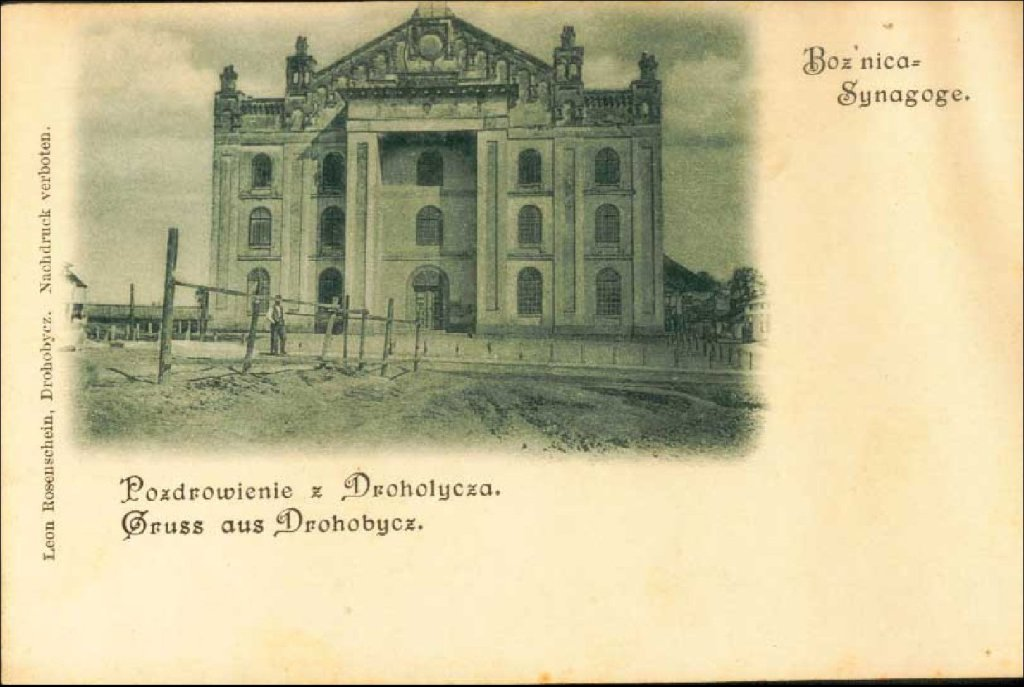 Синагога в Дрогобыче.